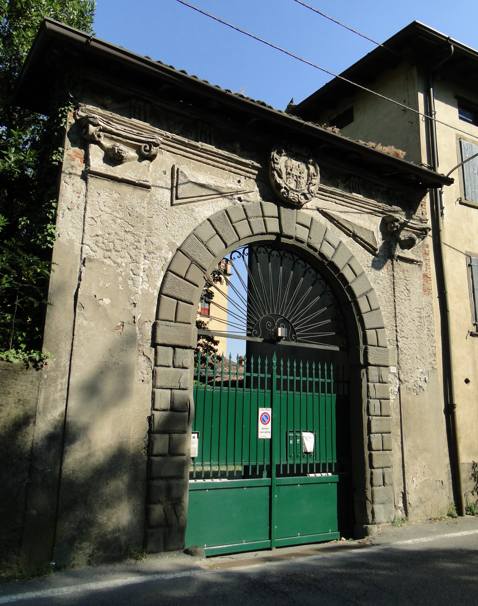 Ranica (BG), loc. Viandasso. Ingresso antico fortilizio